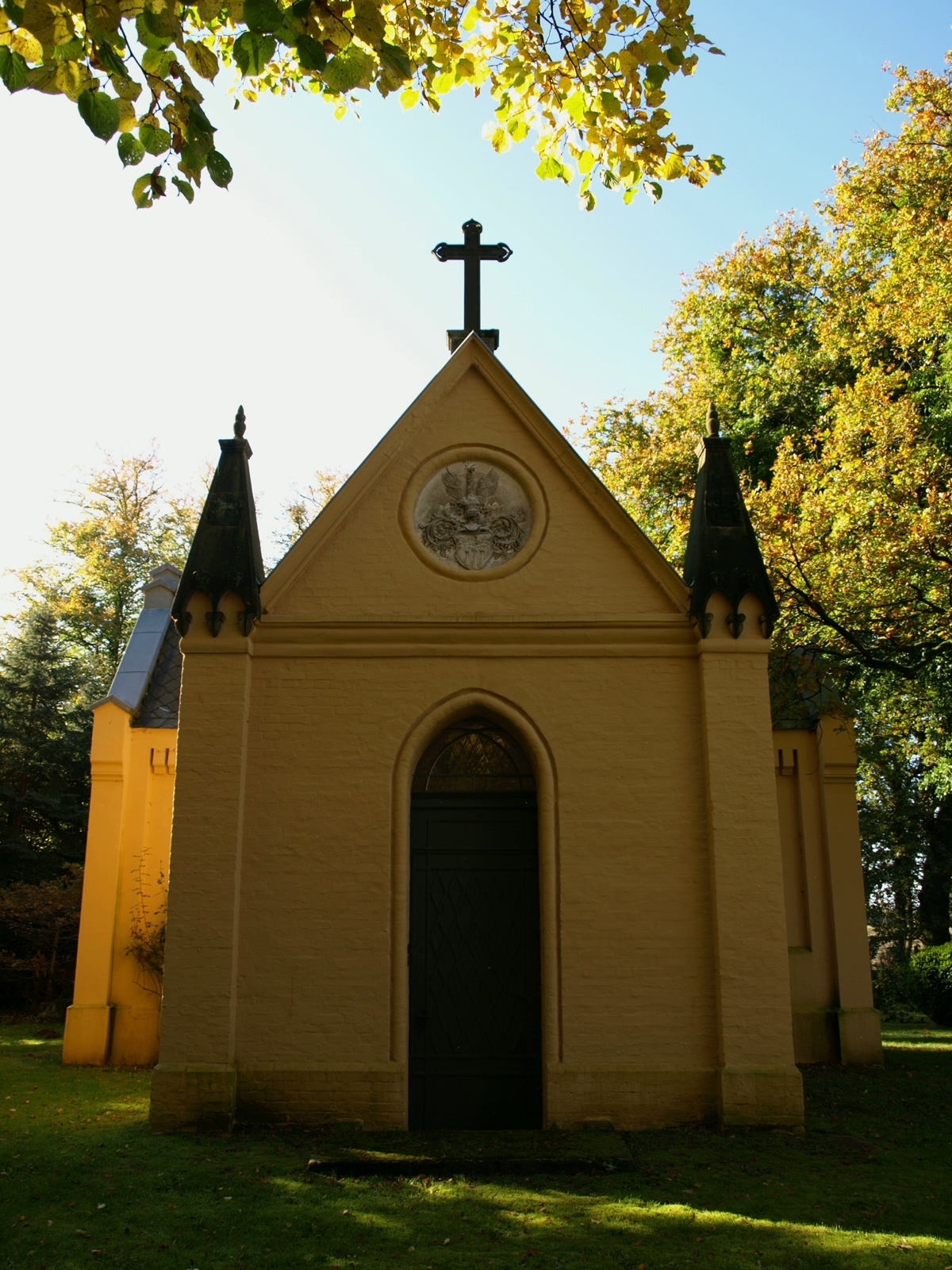 Grabkapelle der Familie von Stern auf dem Kirchhof der St. Martin Kirche Granzin.